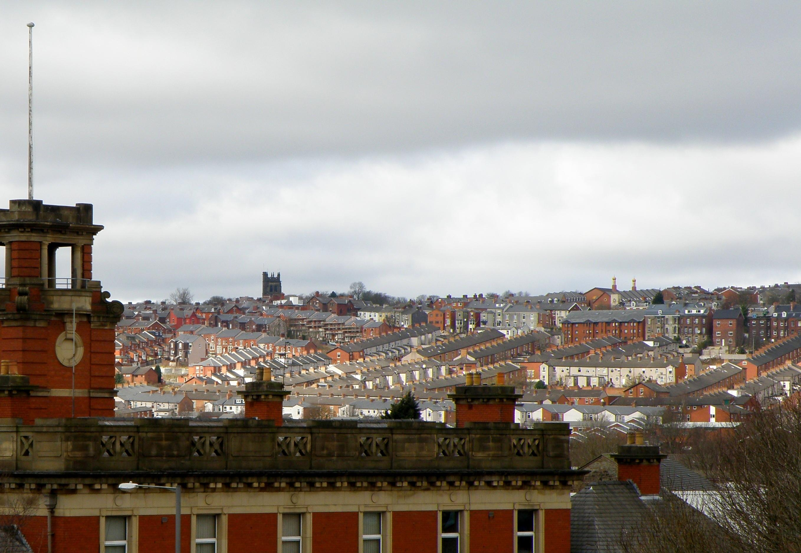 Dachy domów w Blackburn. Na pierwszym planie budynek straży pożarnej.